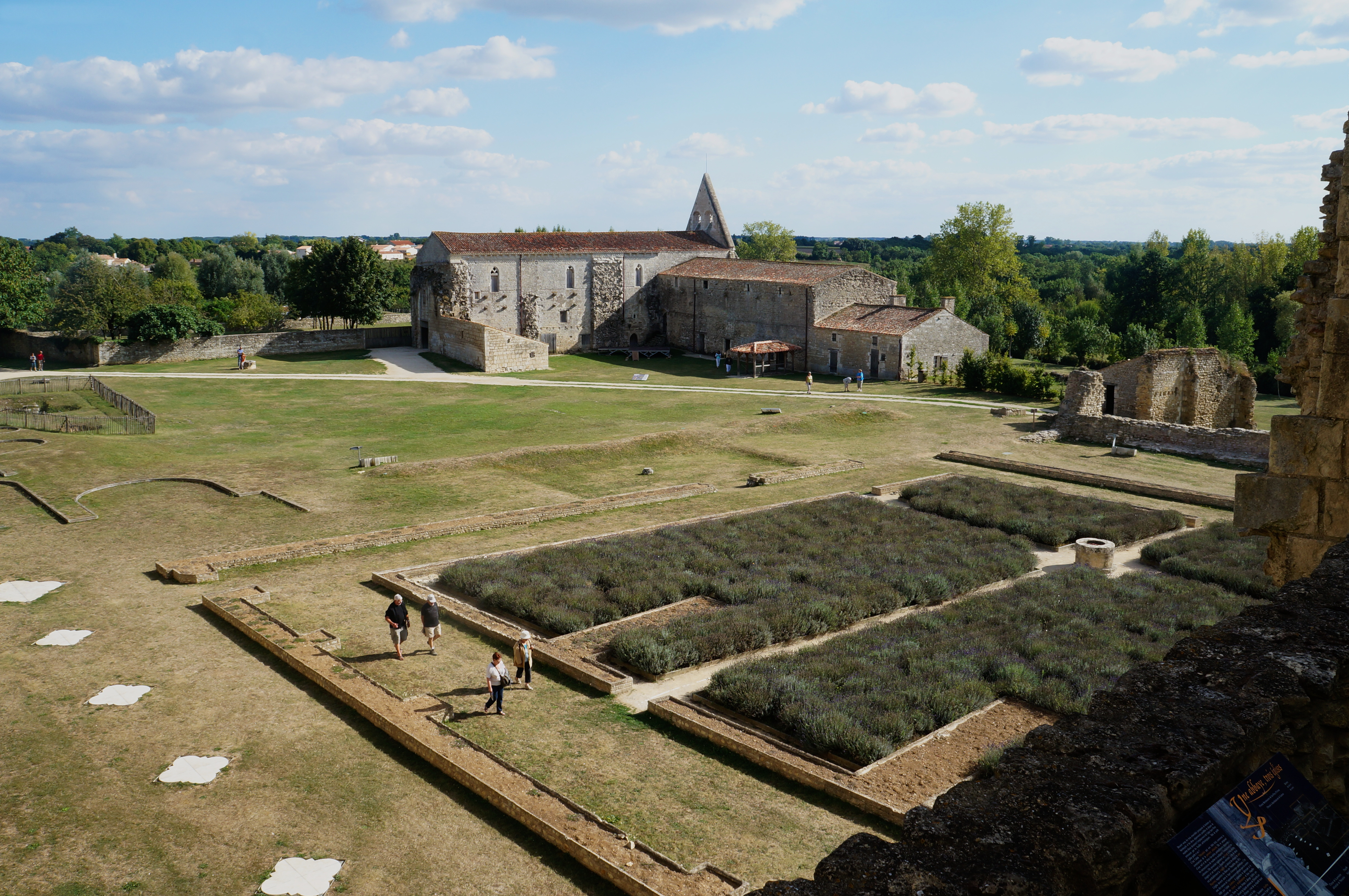 Cathédrale Saint-Pierre de Maillezais Vendée Pays de la Loire.- France .